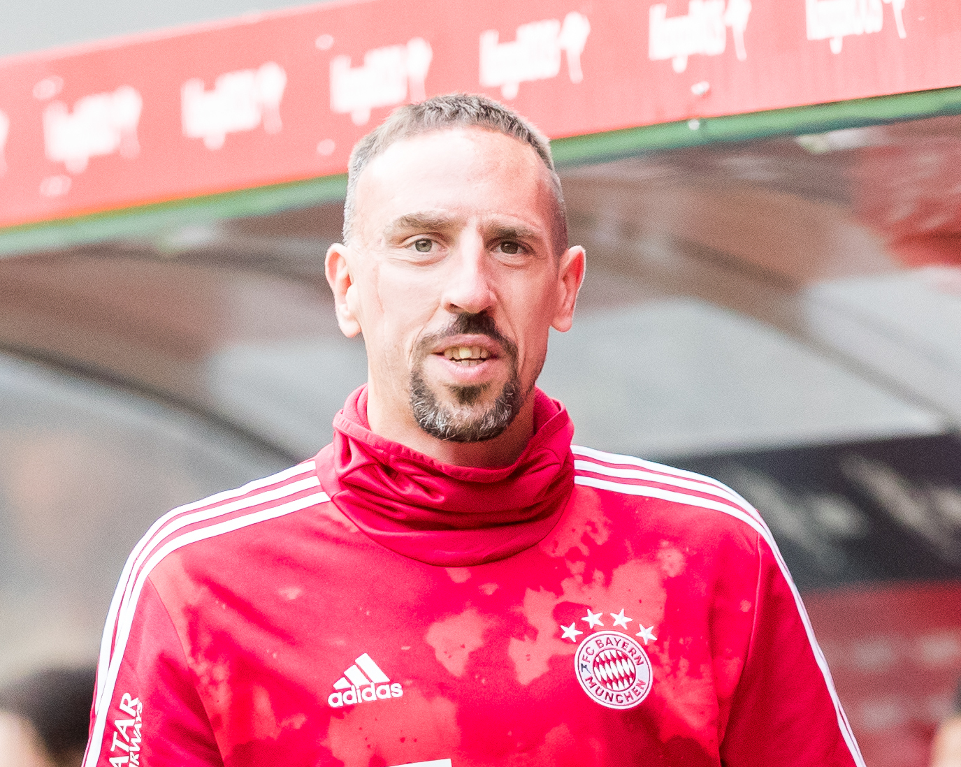 during 1.FC Kaiserslautern vs FC Bayern München at Fritz-Walter-Stadion, Kaiserslautern, Rheinland-Pfalz, Germany on 2019-05-27, Photo: Sven Mandel